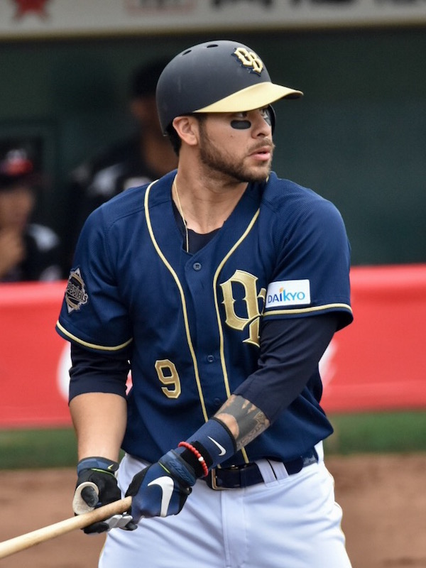 2017年6月24日、ほっともっとフィールド神戸にて撮影